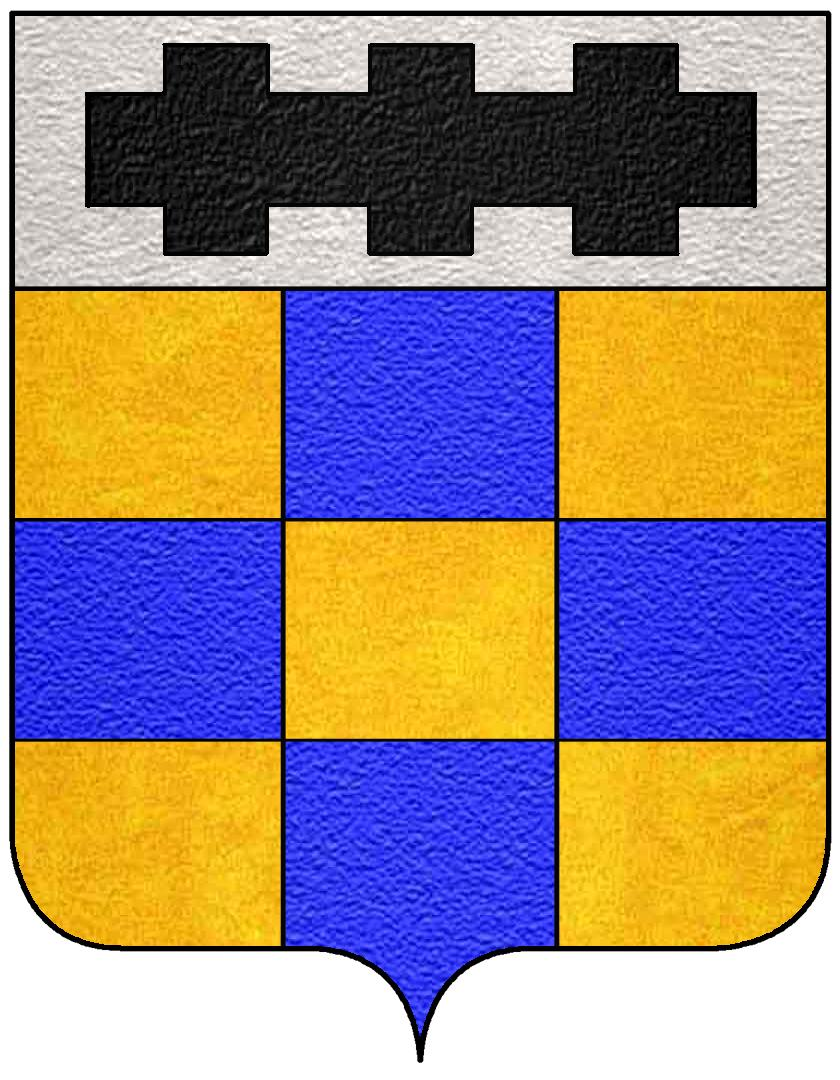 Stemma della famiglia Pallavicini